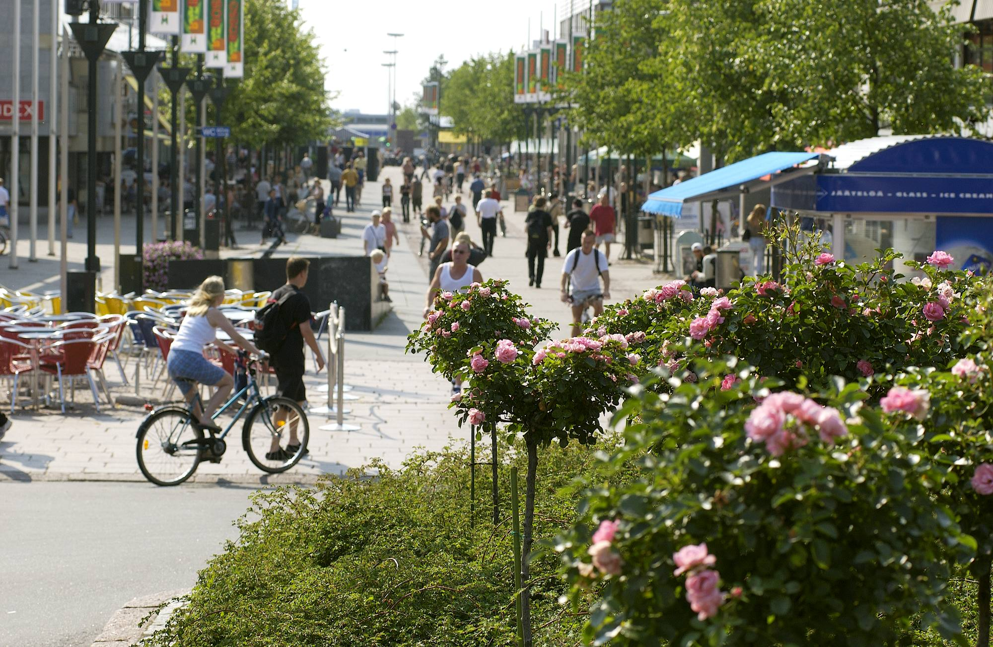 Kouvolan kävelykatu kesällä